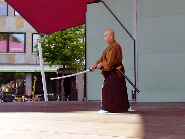 Takada Gakudo (Shigeru) -sensei, Musô Shinden Ryû, Joensuun torilavalla, kesällä 2011.